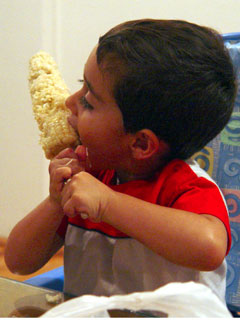 Niño comiendo mazorca de elote en un palo